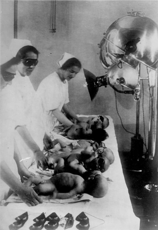 Moderne Heilmittel gegen die überhandnehmende Kindersterblichkeit ! Die Hanauer-Quarzlampen-Gesellschaft hat ein Institut errichtet, in welchem mit den modernsten Mitteln der Kampf gegen die Tuberkulose, Rachites usw. durch Höhensonne aufgenommen worden ist. Tuberkulose Großstadtkinder , welche die Höhenkurorte nicht besuchen können, werden dort durch die heilkräftigen Strahlen der künstlichen Höhensonne geheilt. Säuglinge unter sachkundiger Obhut von Schwestern bei der Bestrahlung durch künstliche Höhensonne.